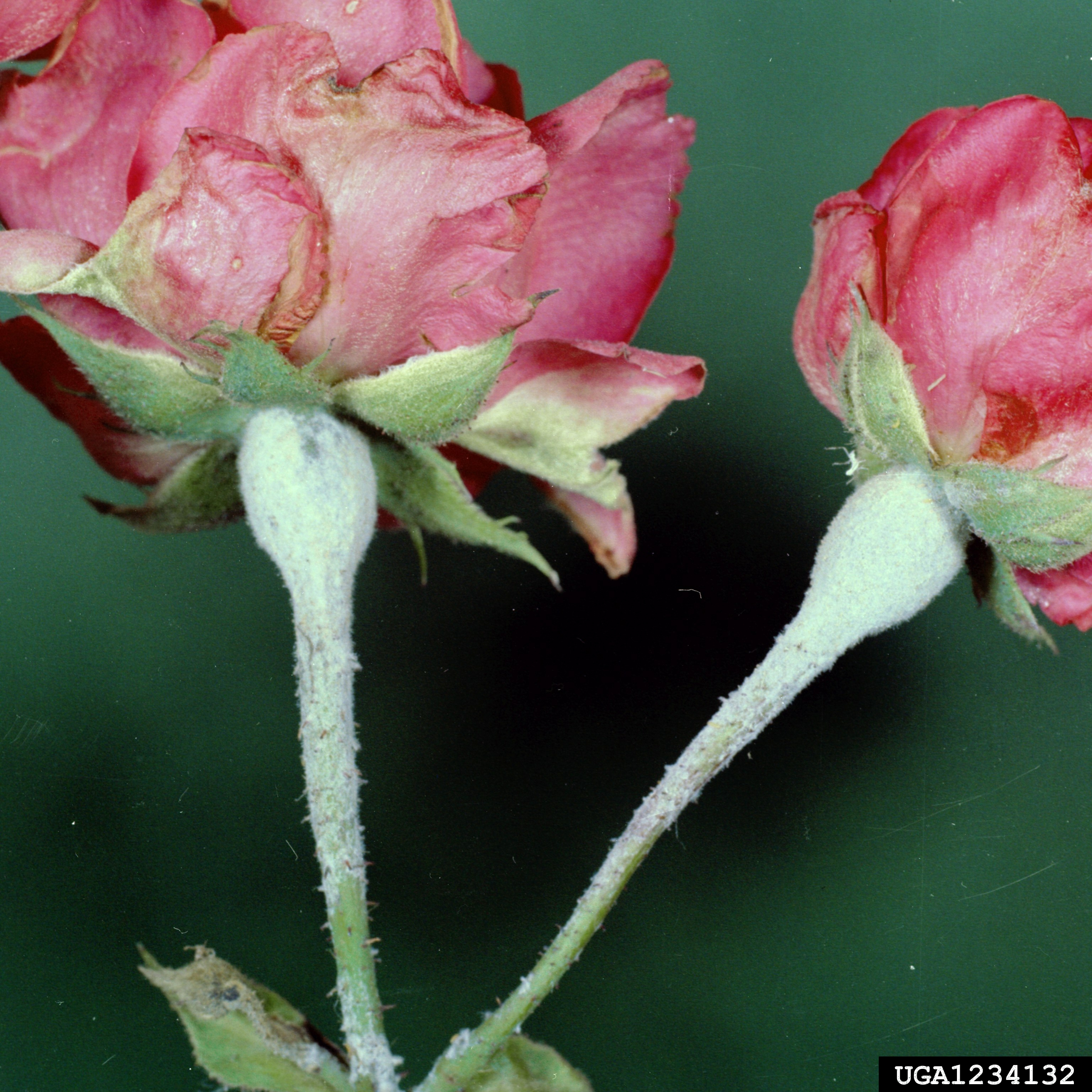 Rose Mildew - Podosphaera pannosa